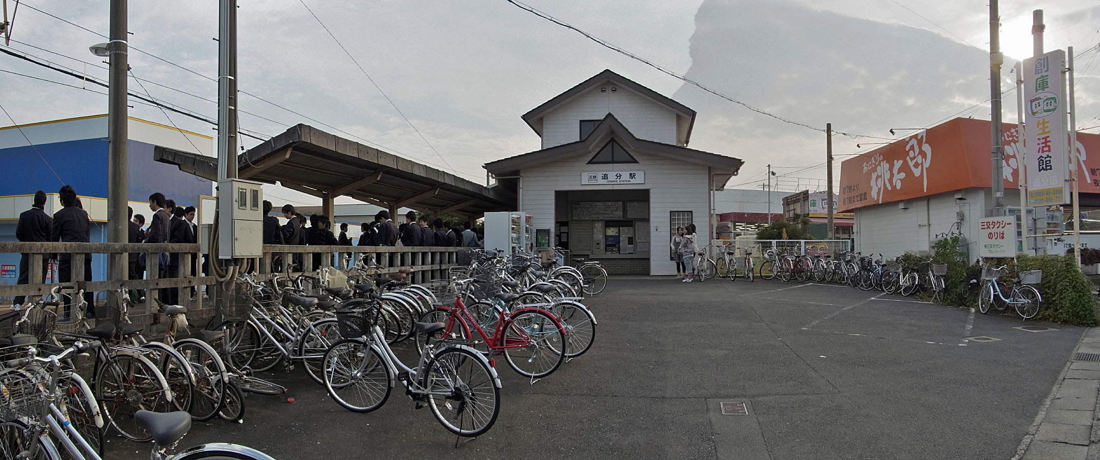 Kintesu Oiwake station , 近鉄 内部線 追分駅